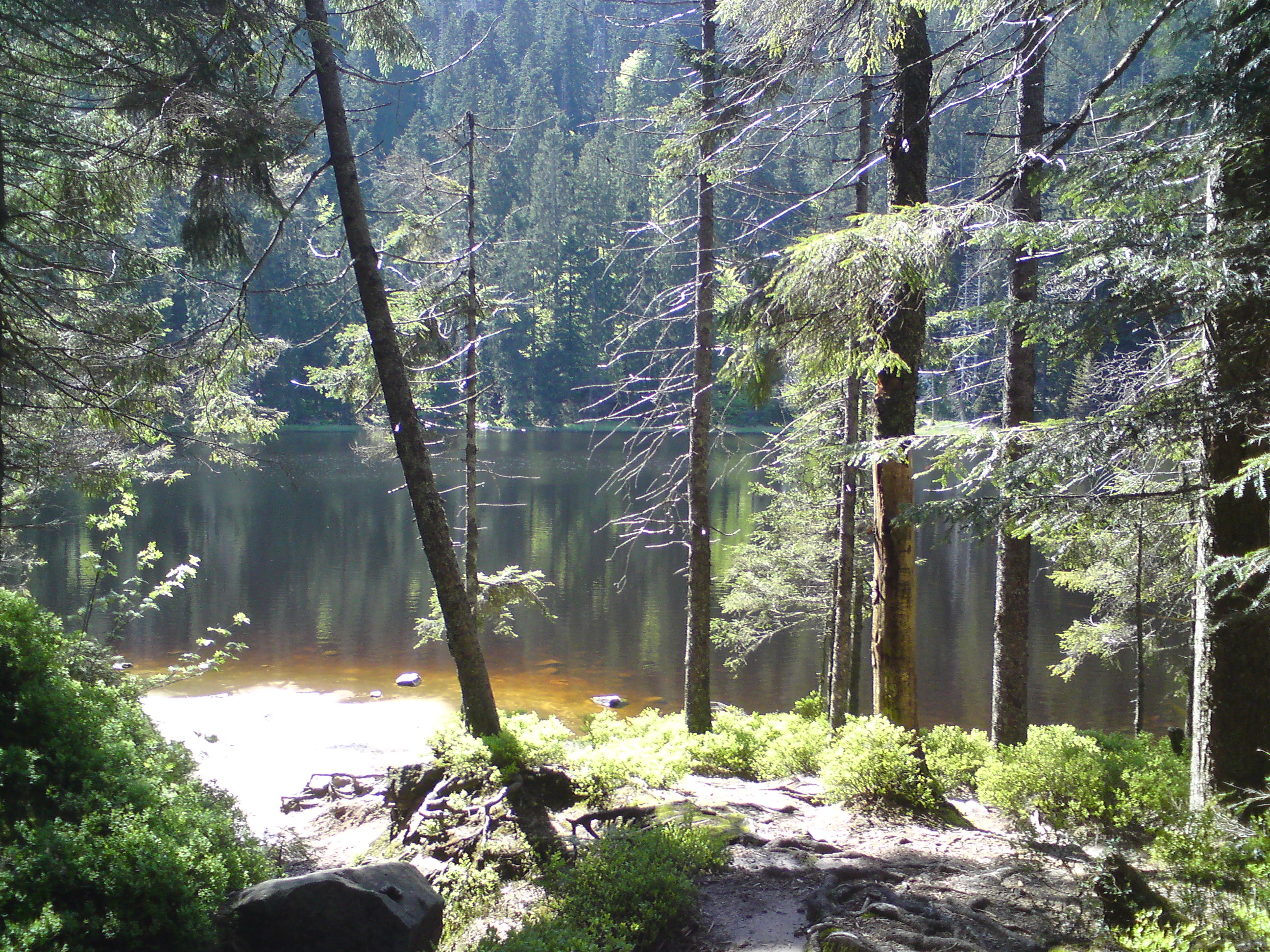 Der Wildsee, ein typischer schwarzwälder Karsee im Bannwald Wilder See